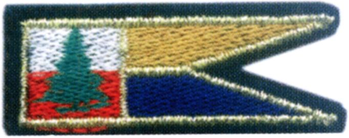 WZÓR GRAFICZNY PROPORCZYKA NA BERET 22 Karpacki Batalion Piechoty Górskiej